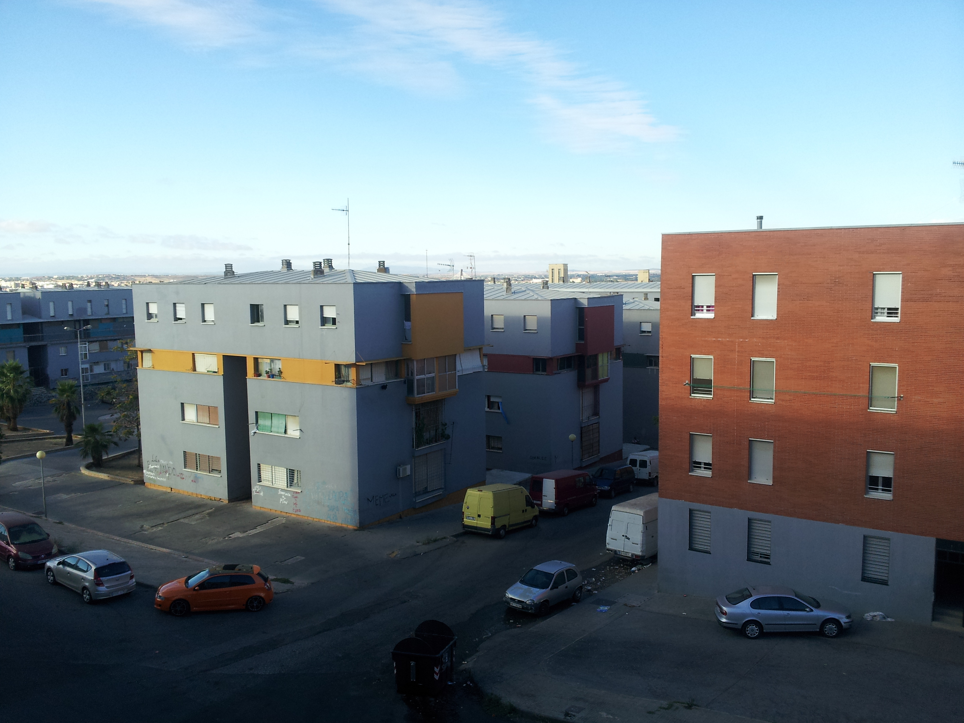 Barriada de Los colorines, en Badajoz